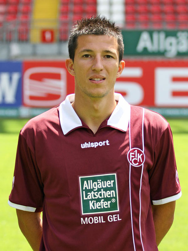 Ilian Micanski, Fußballspieler